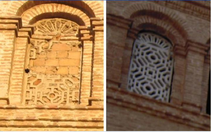 Celosías nuevas (derecha) copiadas de las antiguas (izquierda) ya perdidas.